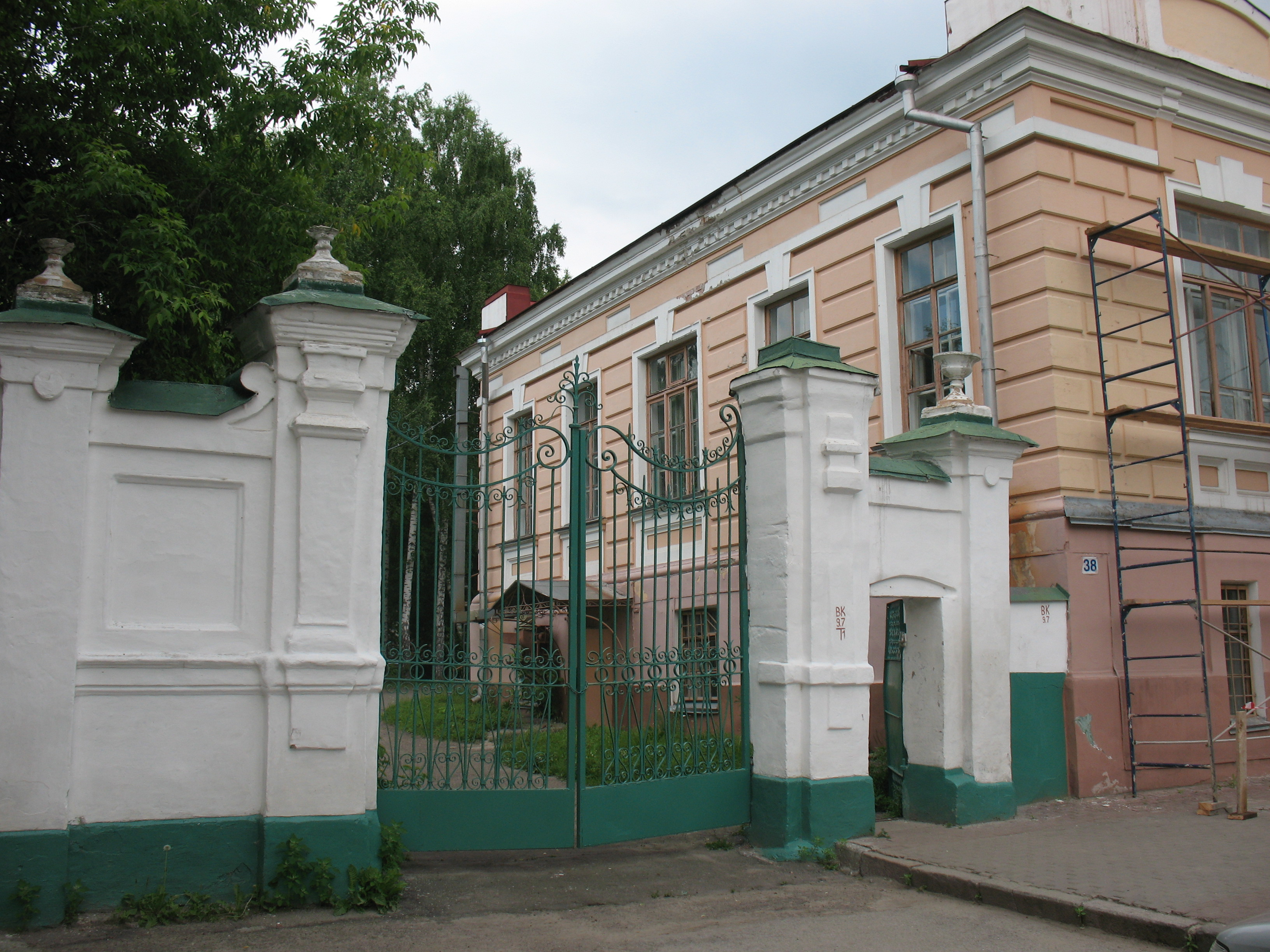 Северные ворота Университетской рощи. Томск